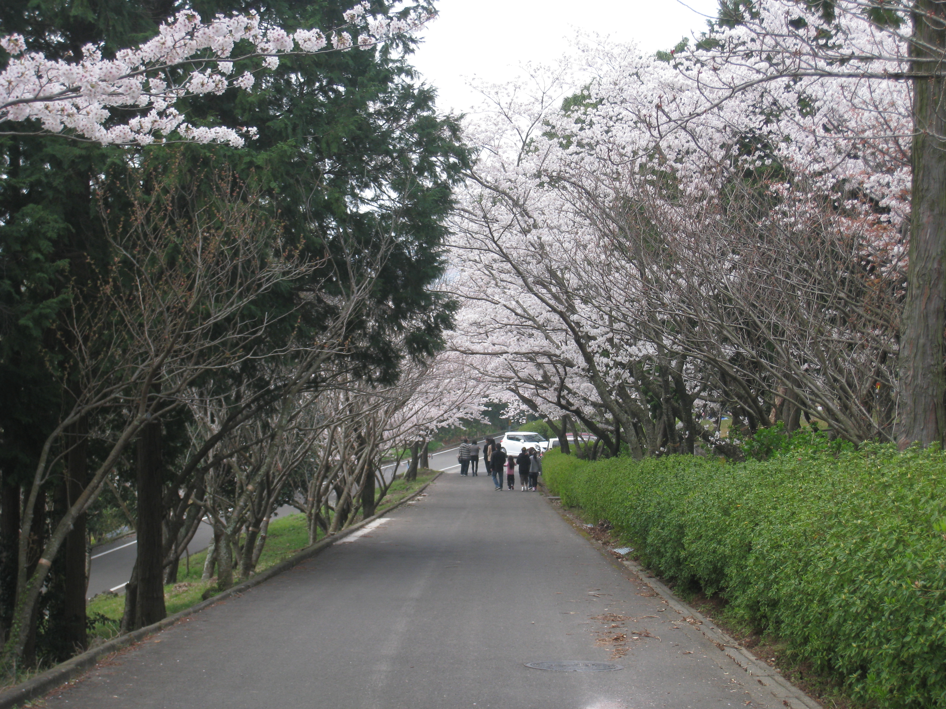 長崎県雲仙市千々石町橘神社入口桜並木